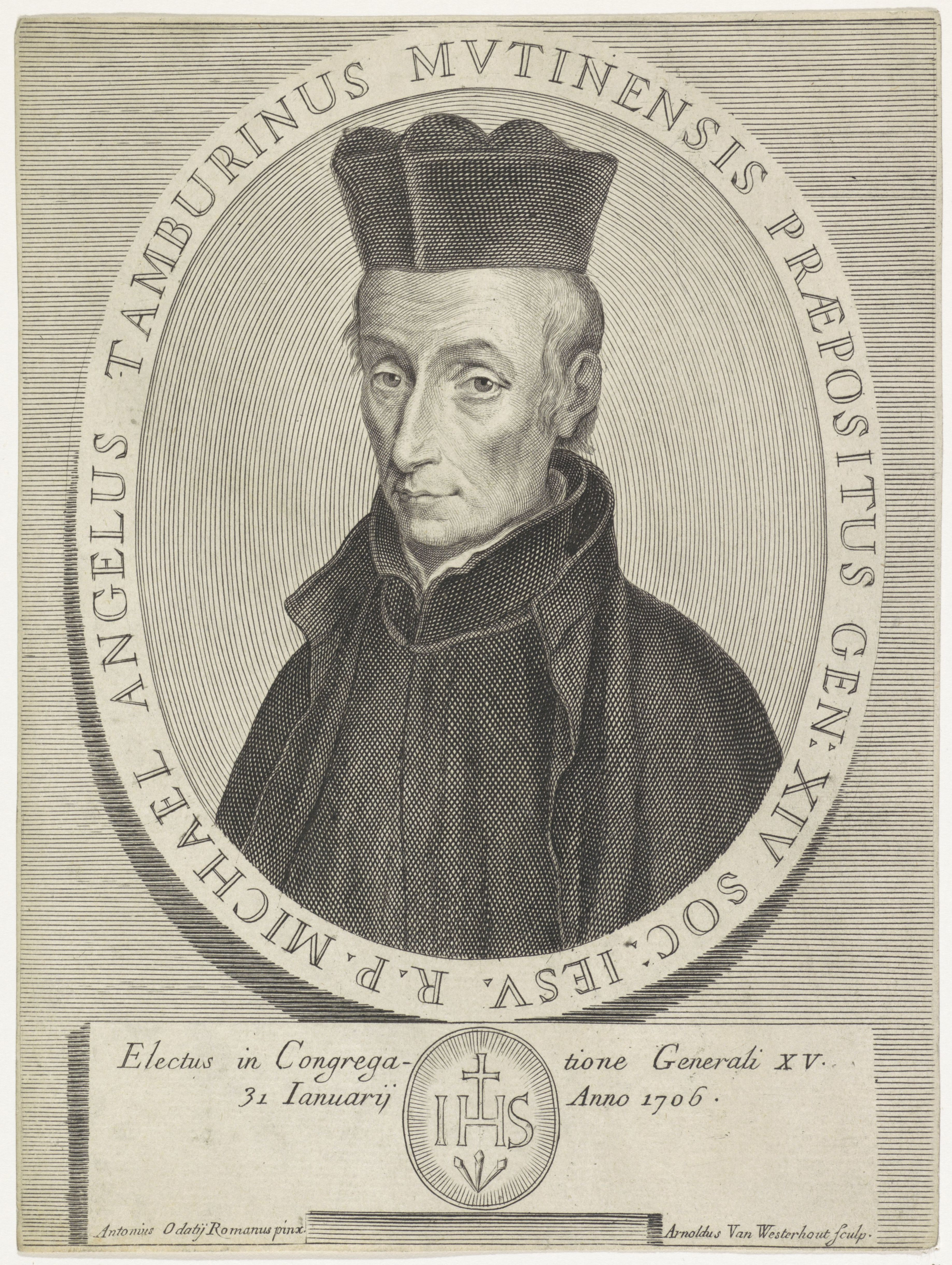 IdentificatieTitel(s): Portret van de jezuïet Michelangelo TamburiniPortretten van generaal oversten van de jezuïeten (serietitel)Objecttype: prent Objectnummer: RP-P-1909-4581Catalogusreferentie: Bodart 208-1(2)Opschriften / Merken: verzamelaarsmerk, verso, gestempeld: Lugt 2228Omschrijving: Portret van de jezuïet Michelangelo Tamburini. Hij draagt een biretta. In het kader onder zijn portret het monogram van de jezuïeten.VervaardigingVervaardiger: prentmaker: Arnold van Westerhout (vermeld op object)naar schilderij van: Antonio Odazzi (vermeld op object)Plaats vervaardiging: ItaliëDatering: 1731Fysieke kenmerken: gravure en etsMateriaal: papier Techniek: graveren (drukprocedé) / etsenAfmetingen: blad: h 200 mm × b 150 mmOnderwerpWat: IHS ('Iesus Hominum Salvator') ~ symbol of ChristWie: Michelangelo TamburiniVerwerving en rechtenVerwerving: aankoop 1905Copyright: Publiek domein